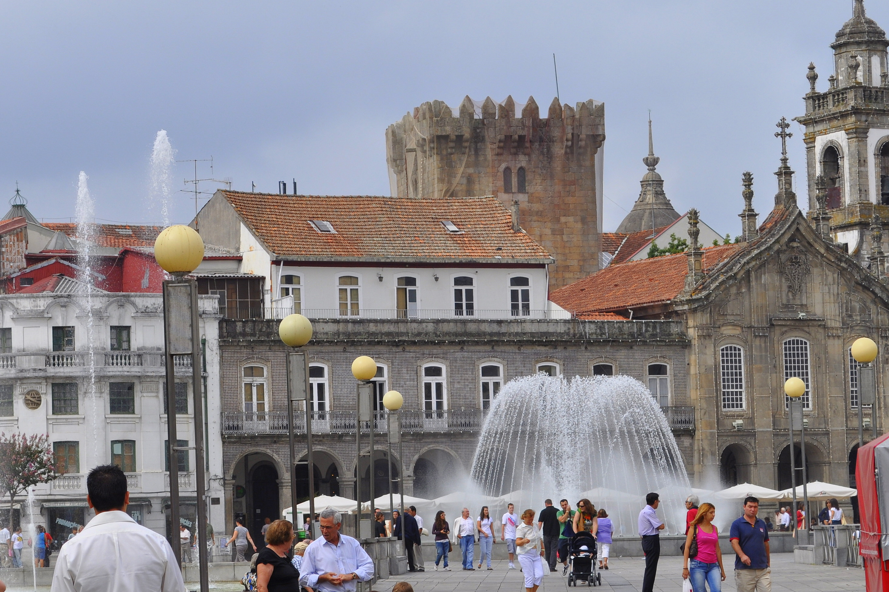 Avenida Central, Braga.